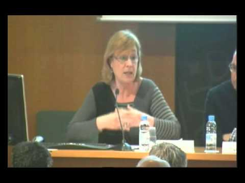 Maria Corominas i Piulats